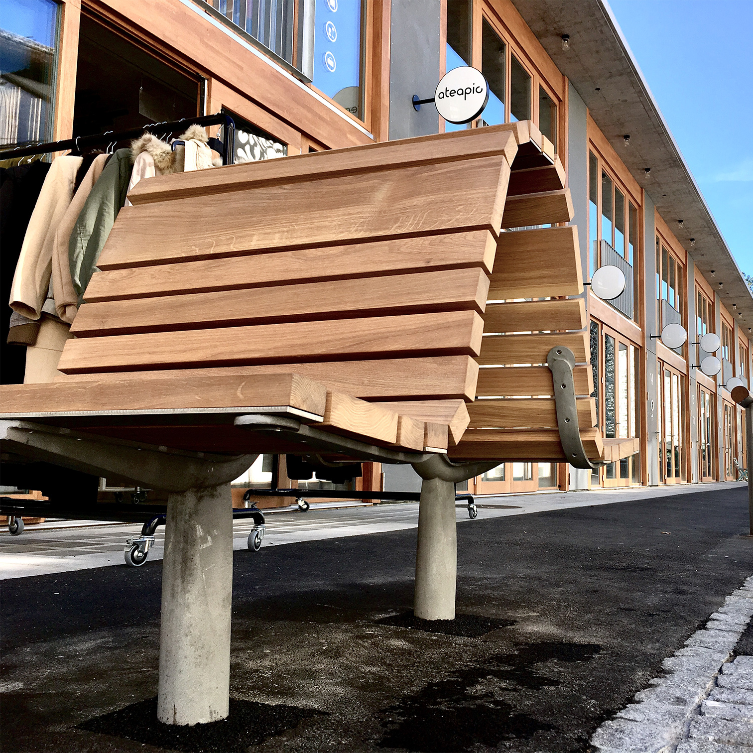 Un banc du Flon